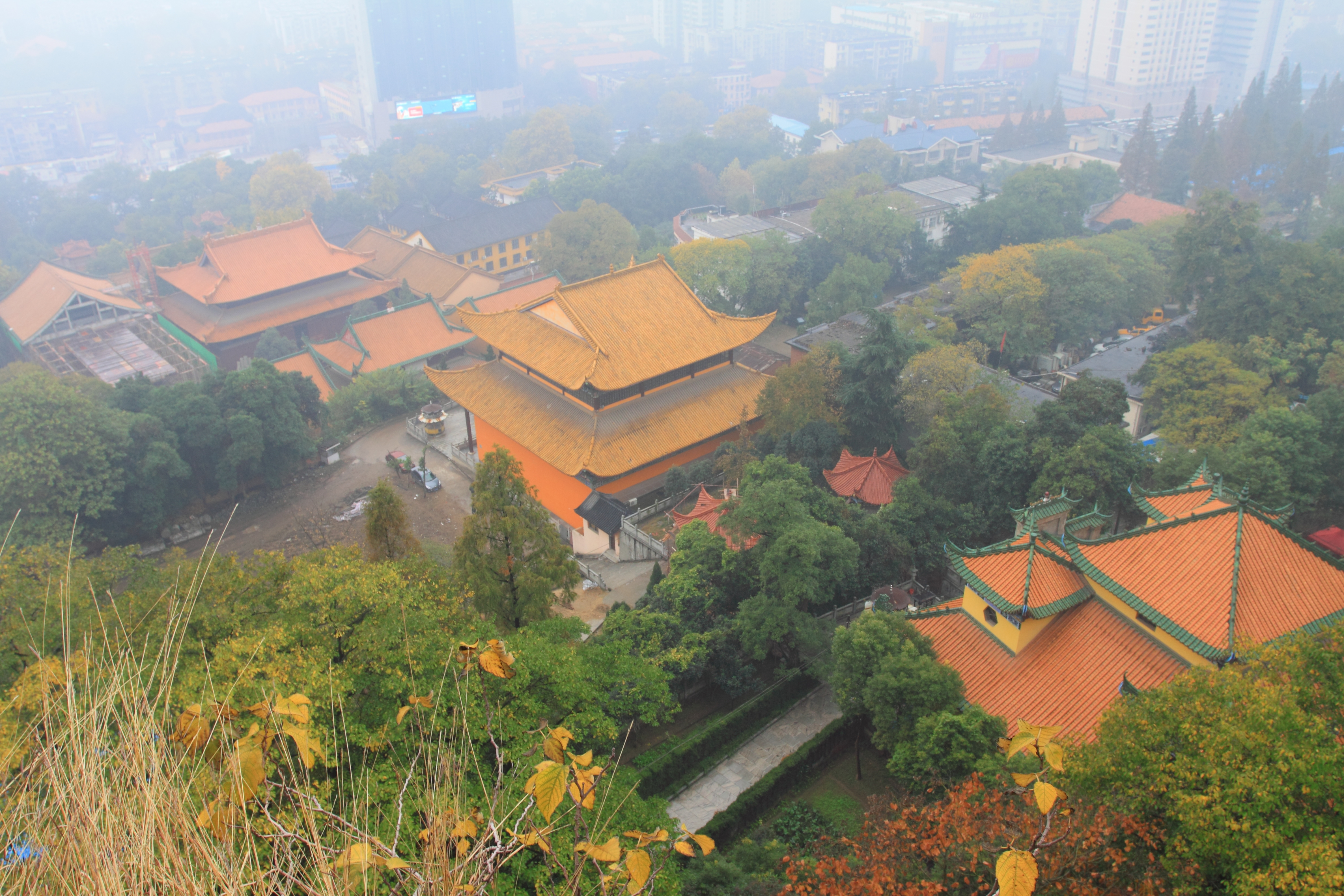 洪山宝塔上俯瞰宝通寺全景